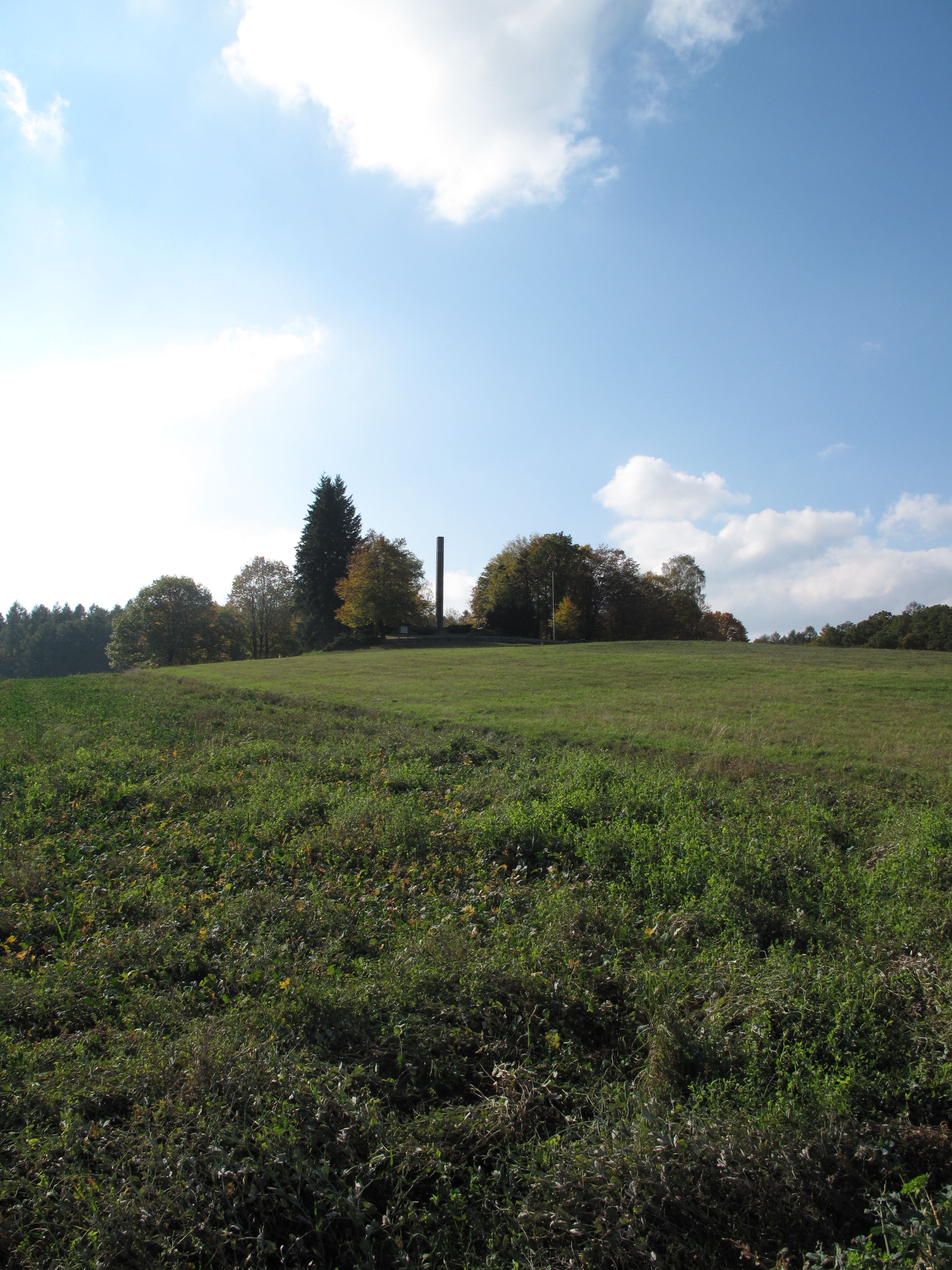 Ostrá hůrka (317 m). Okres Opava, Česká republika.